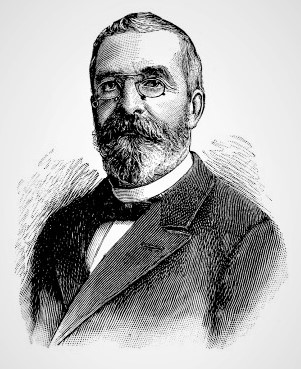 Dr Ladame - La Chronique médicale : revue bi-mensuelle de médecine scientifique, littéraire & anecdotique 19e siècle Revue : La Chronique médicale : revue bi-mensuelle de médecine scientifique, littéraire & anecdotique, 1896, n° 03 Edition : Paris : Chronique médicale, 1896